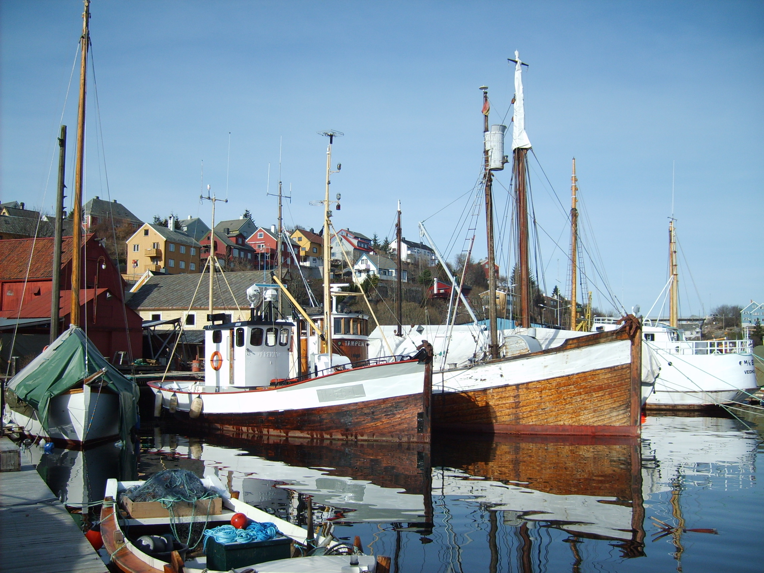 Kutterar ved Mellemværftet i Kristiansund på Nordmøre.